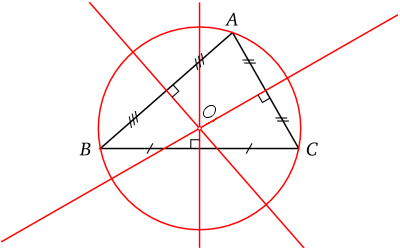 Médiatrice et cercle circonscrit d'un triangle.